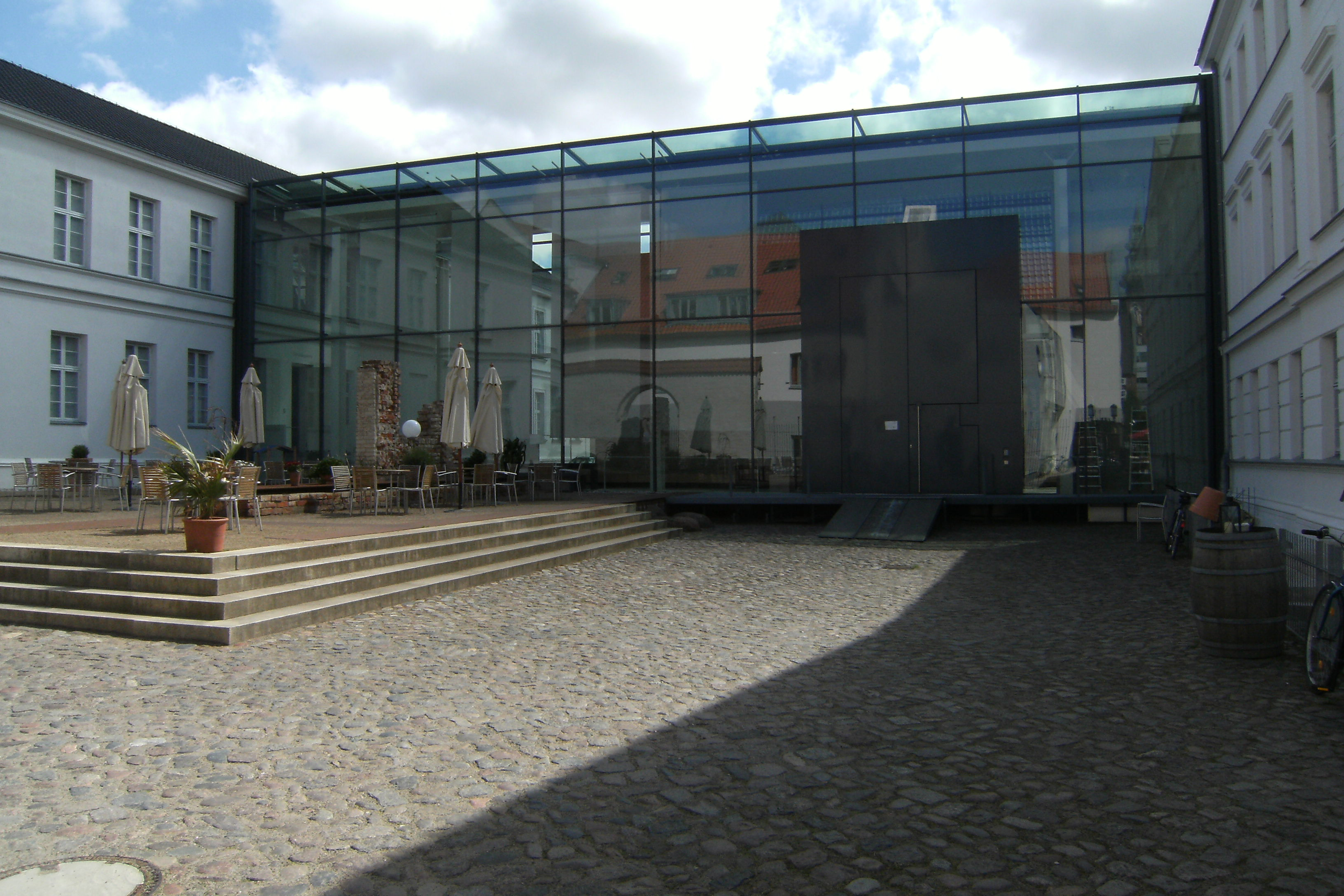 Gläserner Verbindungsbau mit Cafe im PLM Greifswald